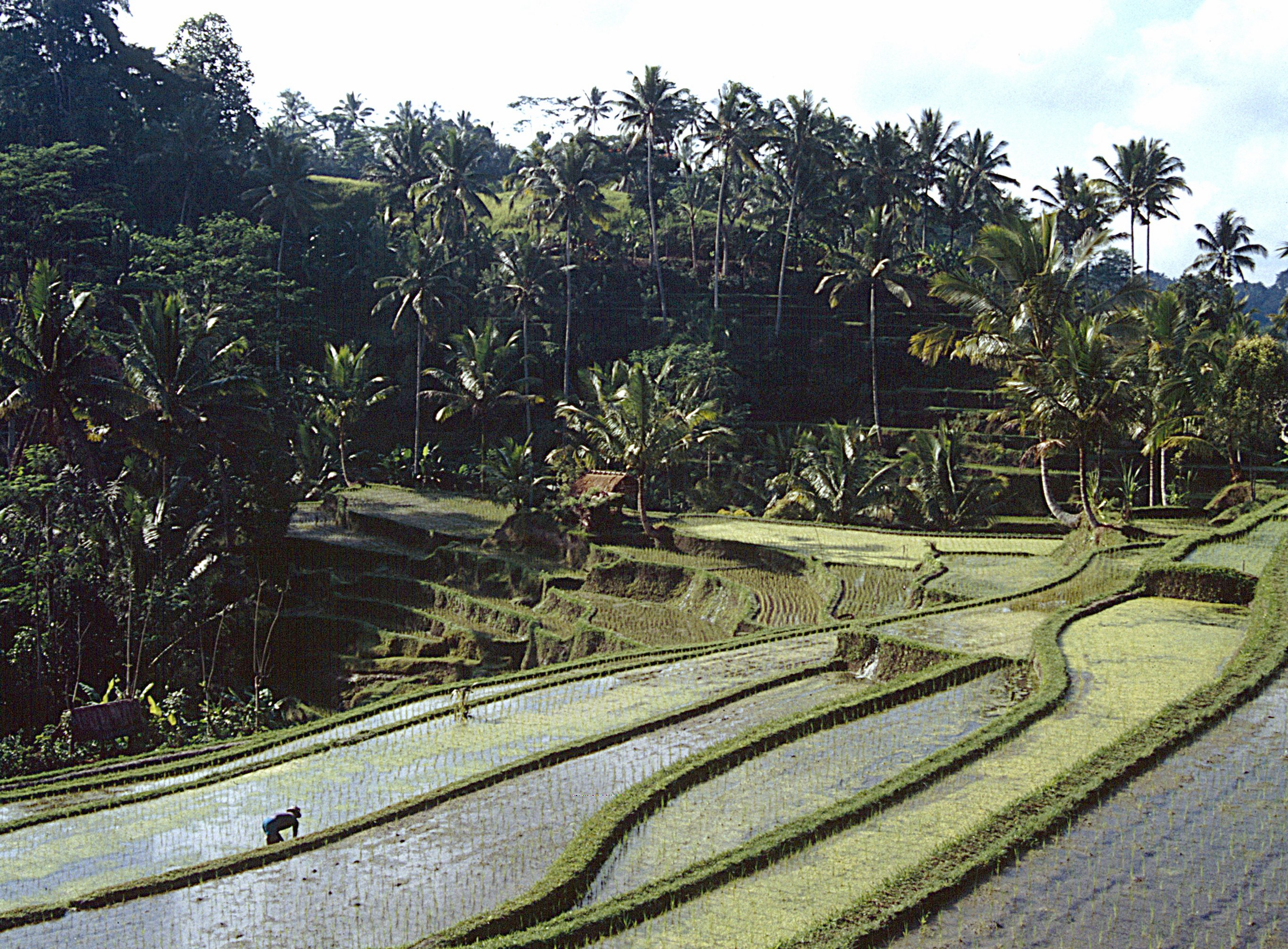 Tampaksiring: Reisfelder